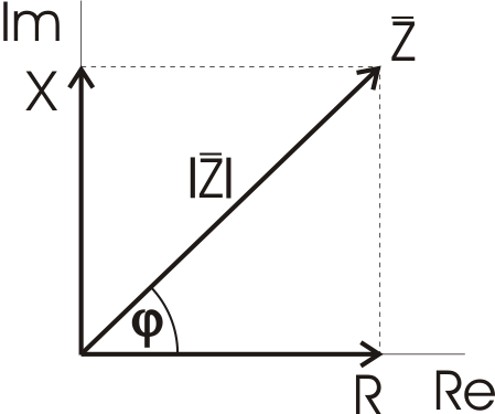 Impedance zanesená do grafu